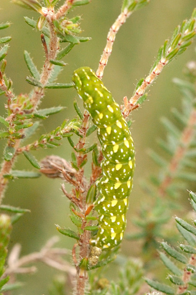 Anarta myrtilli from Commanster, Belgian High Ardennes .